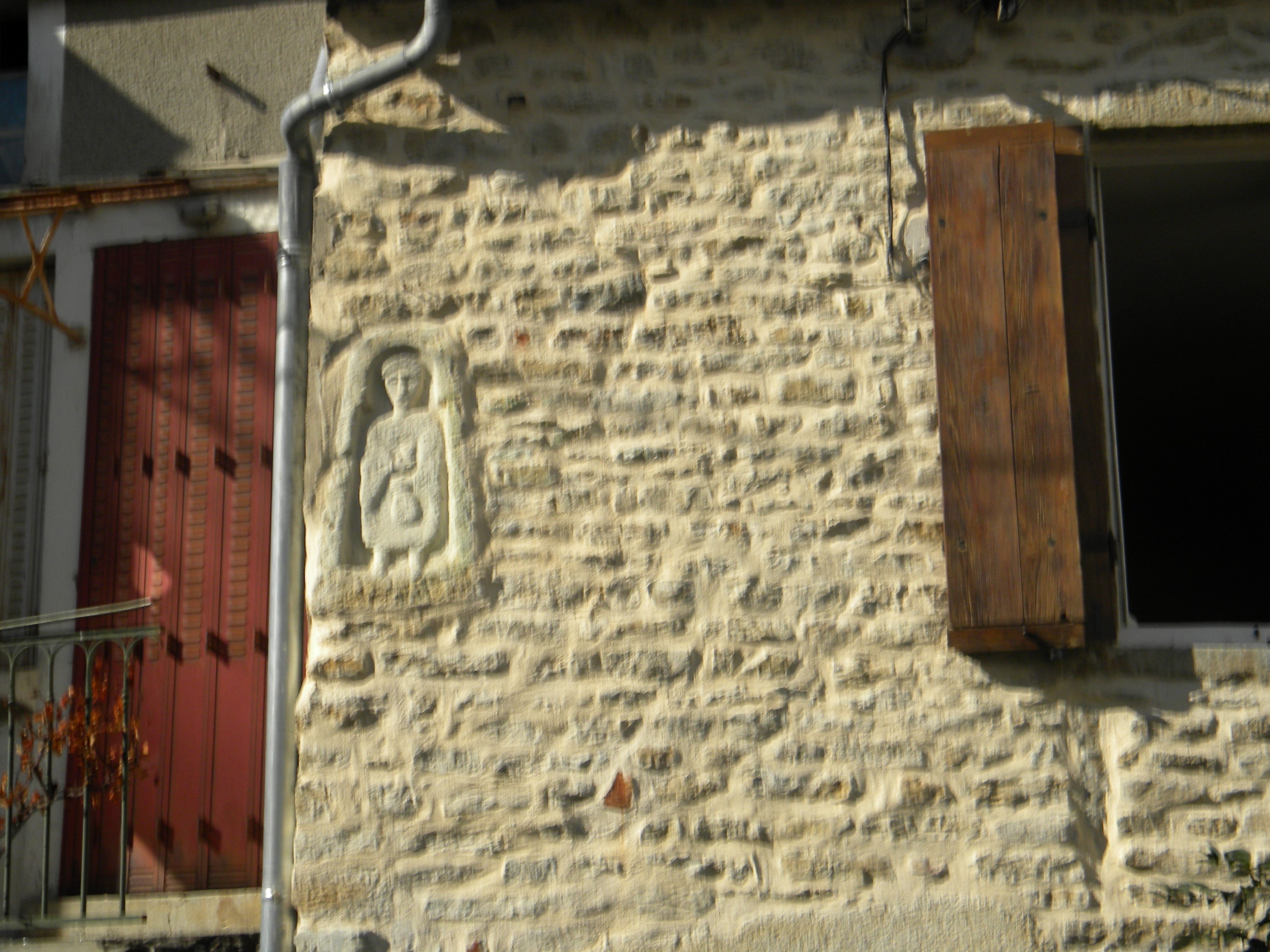 Stèle gallo-romaine d'origine Nolay inclue dans une maison de Cormot-le-Grand